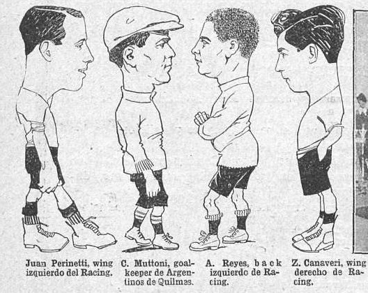 caricaturas de los futbolistas Perinetti, Muttoni, Reyes y Canaveri (1914)